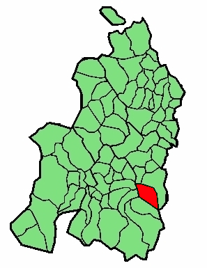 aipaturiko udalerriaren kokapena Nafarroa Beherean